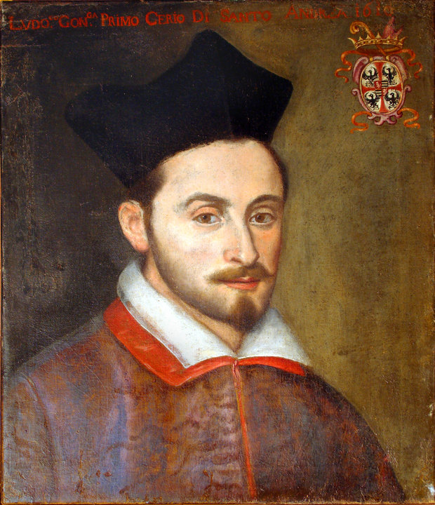 Ritratto di Ludovico Gonzaga